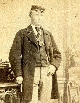 Gustav Münch als Corpsstudent (Corps Saxonia Karlsruhe)